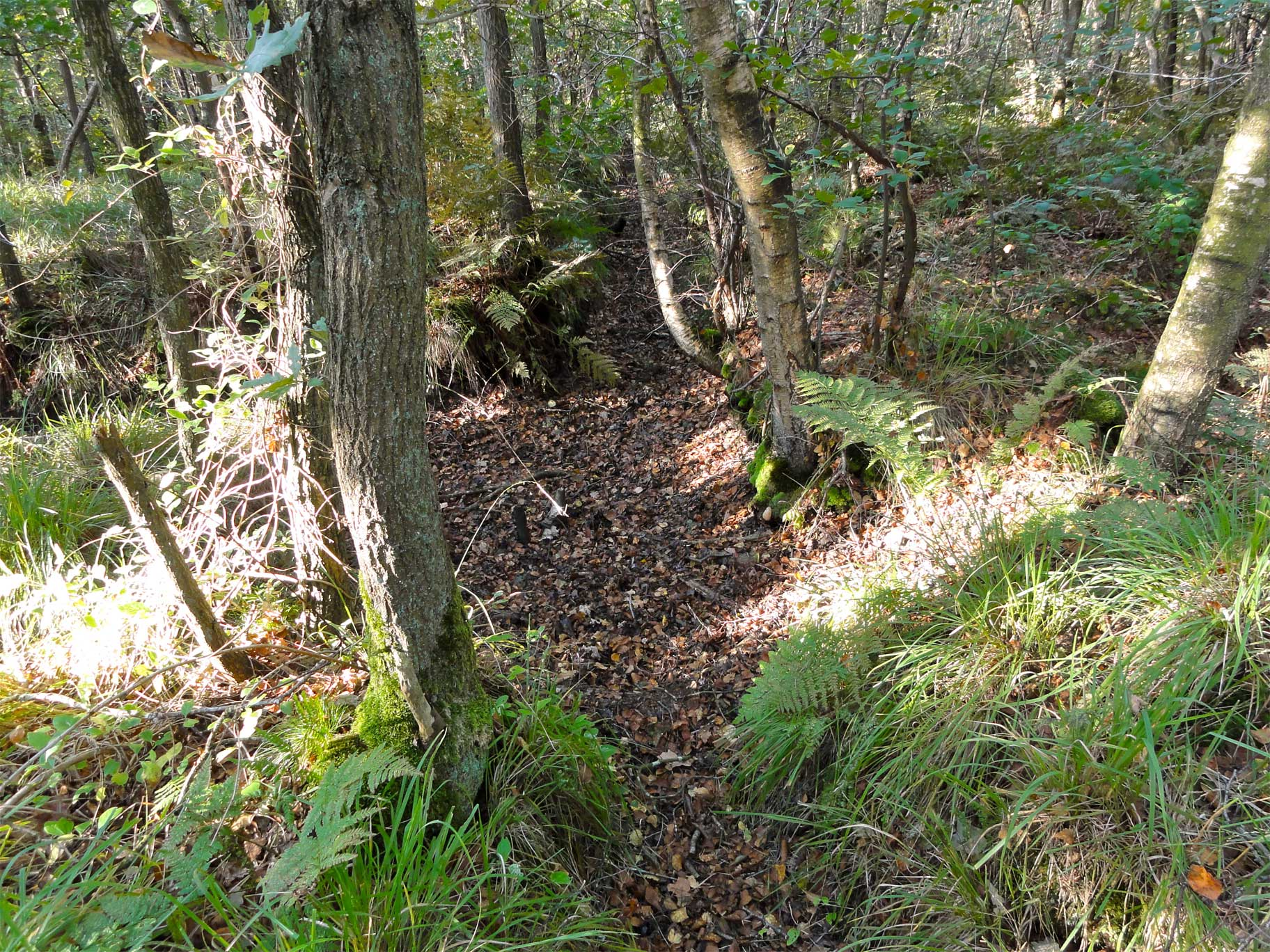 Starnumanbossen met de typerende rabatstructuur